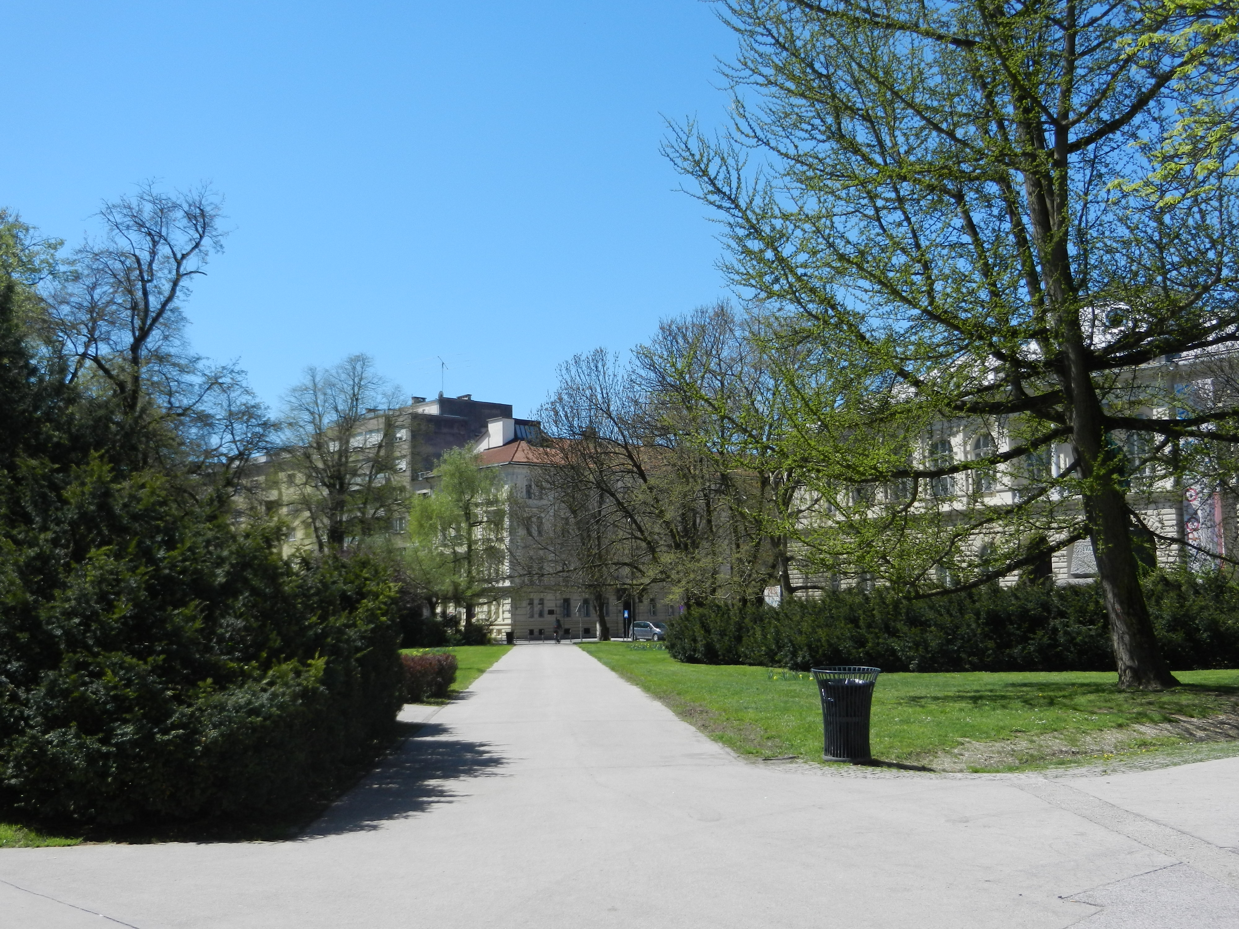 Muzejski park, sedaj Trg narodnih herojev v Ljubljani